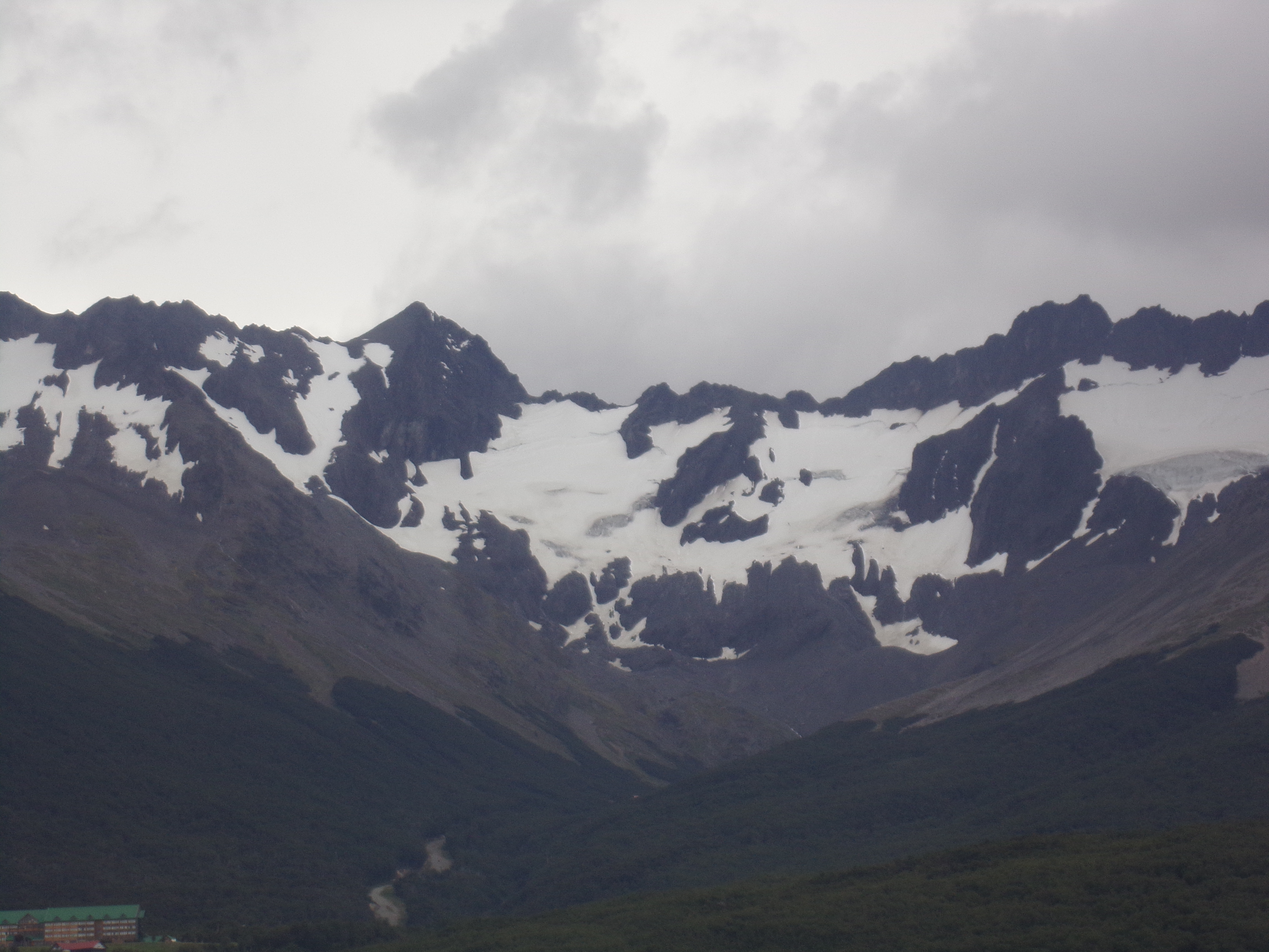 Glaciar Martial